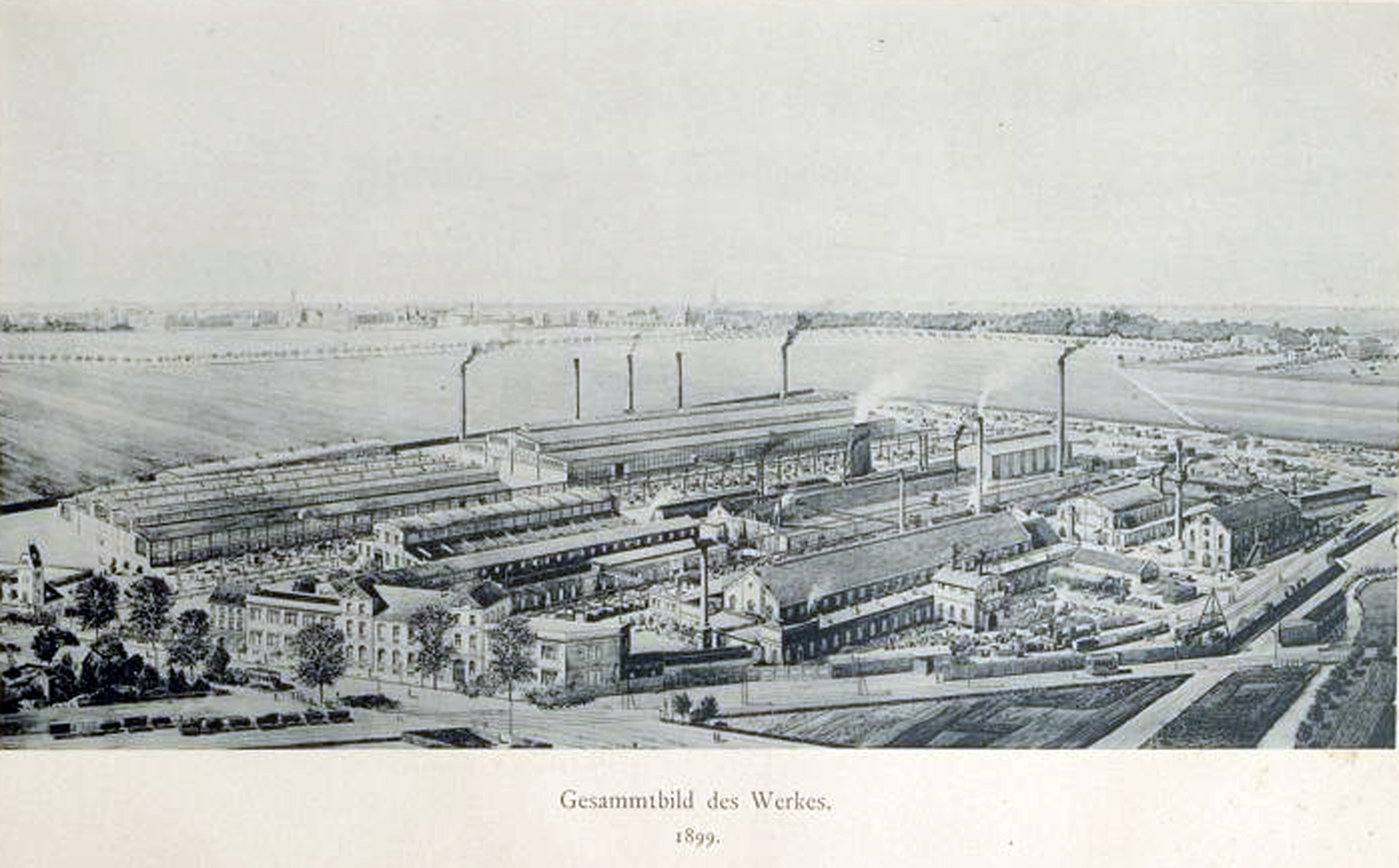 Haniel & Lueg, Gesamtbild des Werkes 1899